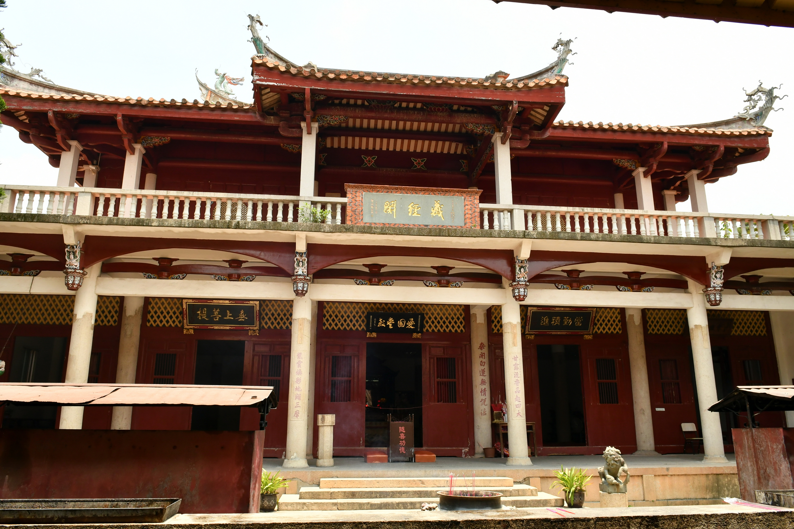 泉州开元寺的藏经阁，收藏经卷典籍。